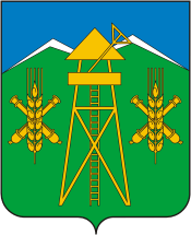 Герб Владимирского сельского поселения, Краснодарский край, Россия.